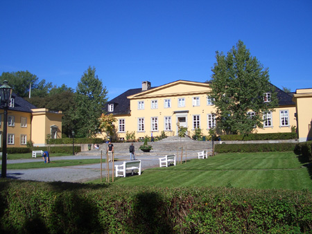 Bilde av Blindern Studenterhjem